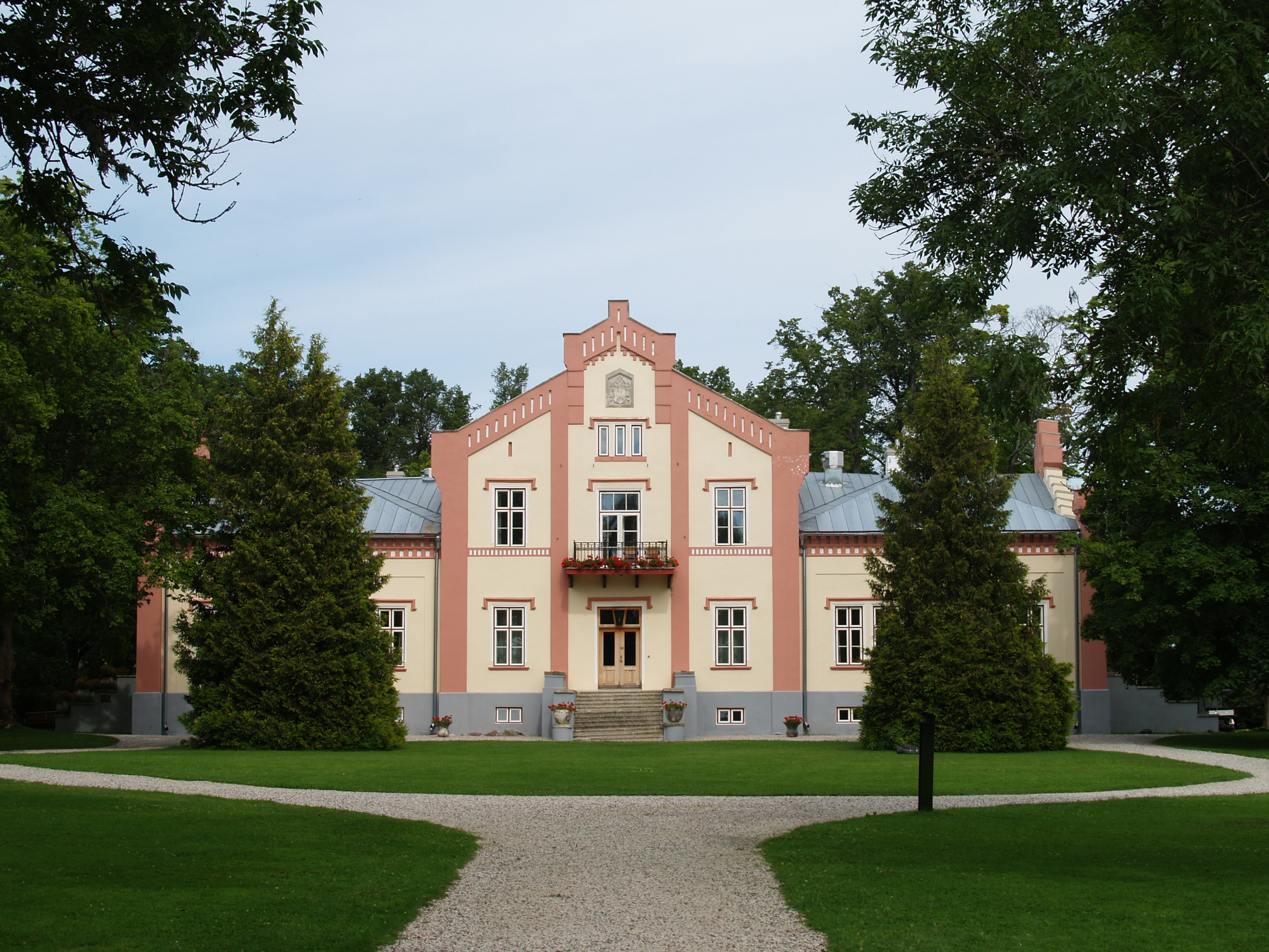 Pädaste mõisa peahoone